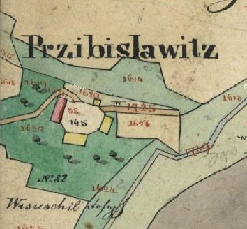 Photo of Pribyslavice's catasdre from 1842